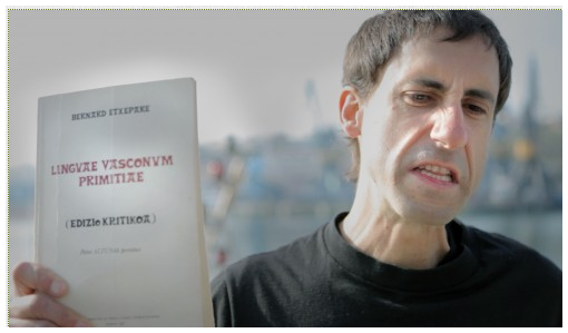 Imanol Epelde Pagola - Etxepare Rap proiektuko argazki bat